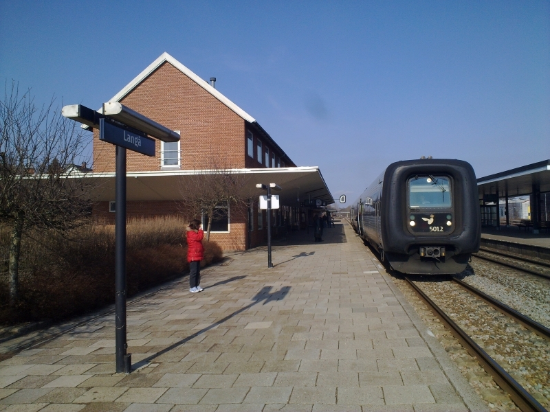 Langå station